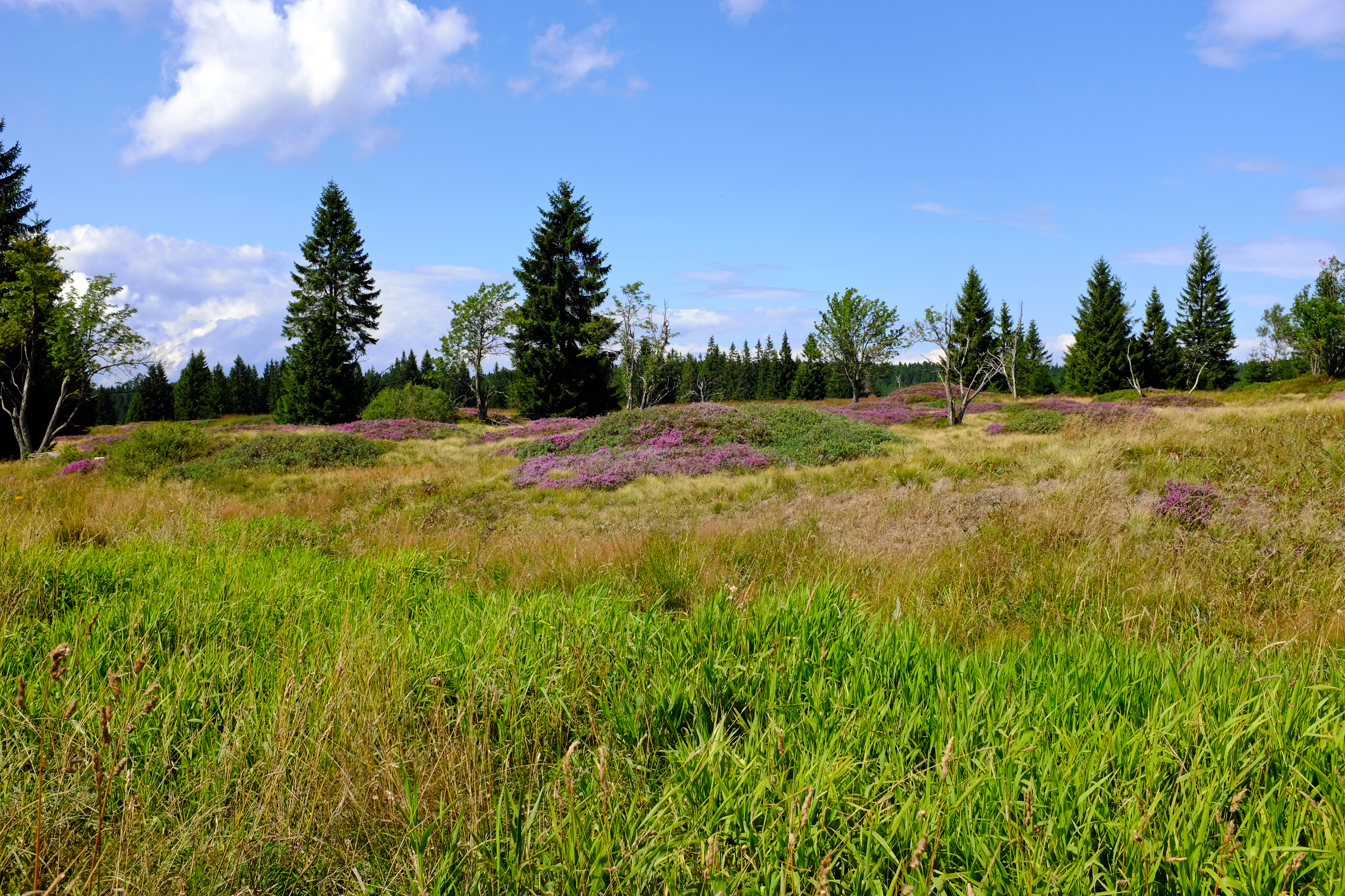 Sejpy rudného dolu, parcely pp. 613/2, 632/2, 652/1, 654, 655, 760/3 (západně od vsi), Boží Dar.